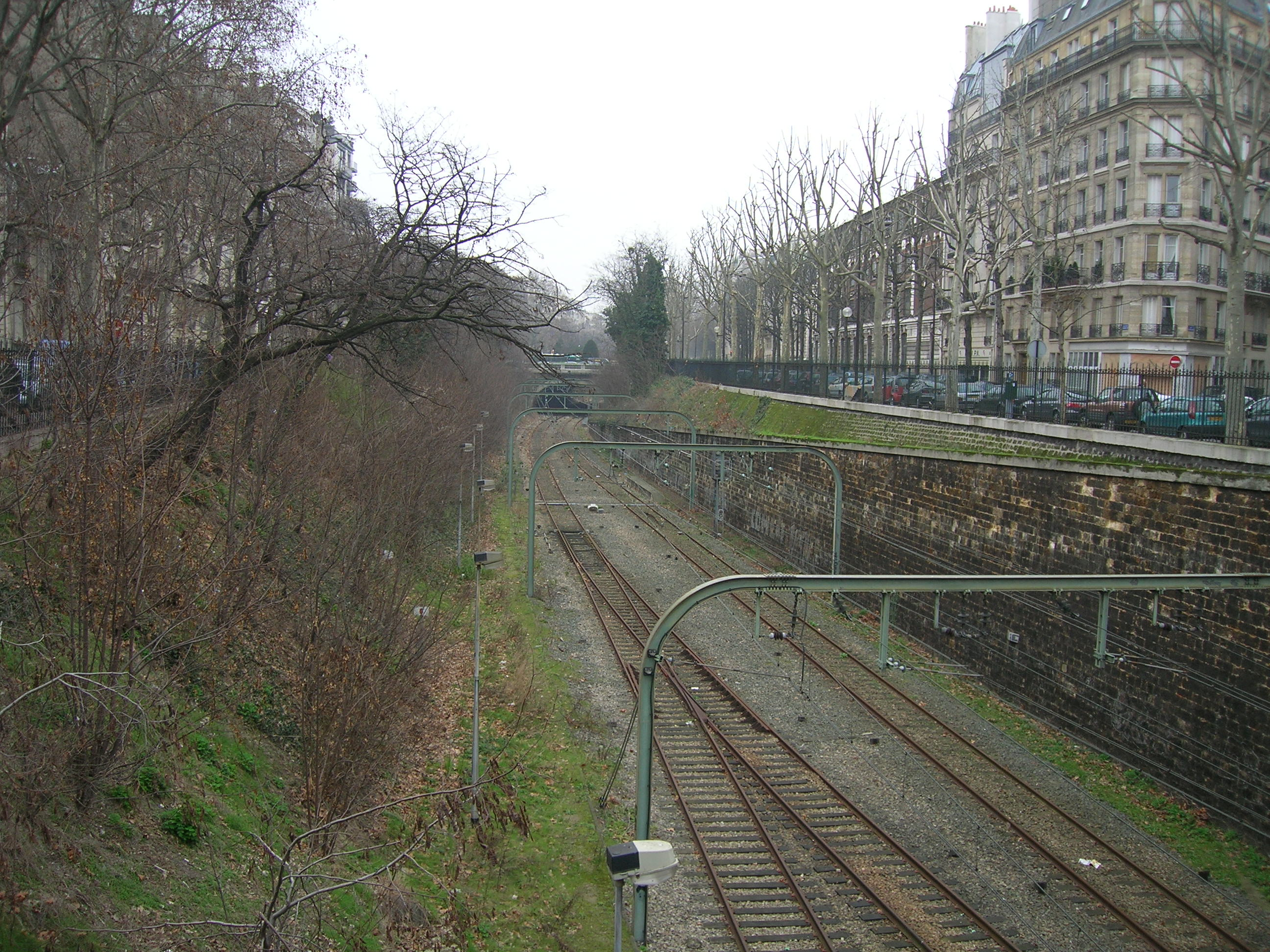 Ligne d'Auteuil entre Pereire et Pont-Cardinet, vue vers le Nord, depuis le pont de la rue Alphonse de Neuville, Paris 17e, France